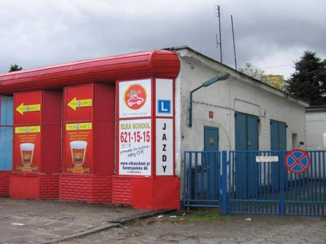 Podstacja trolejbusowa dworzec główny